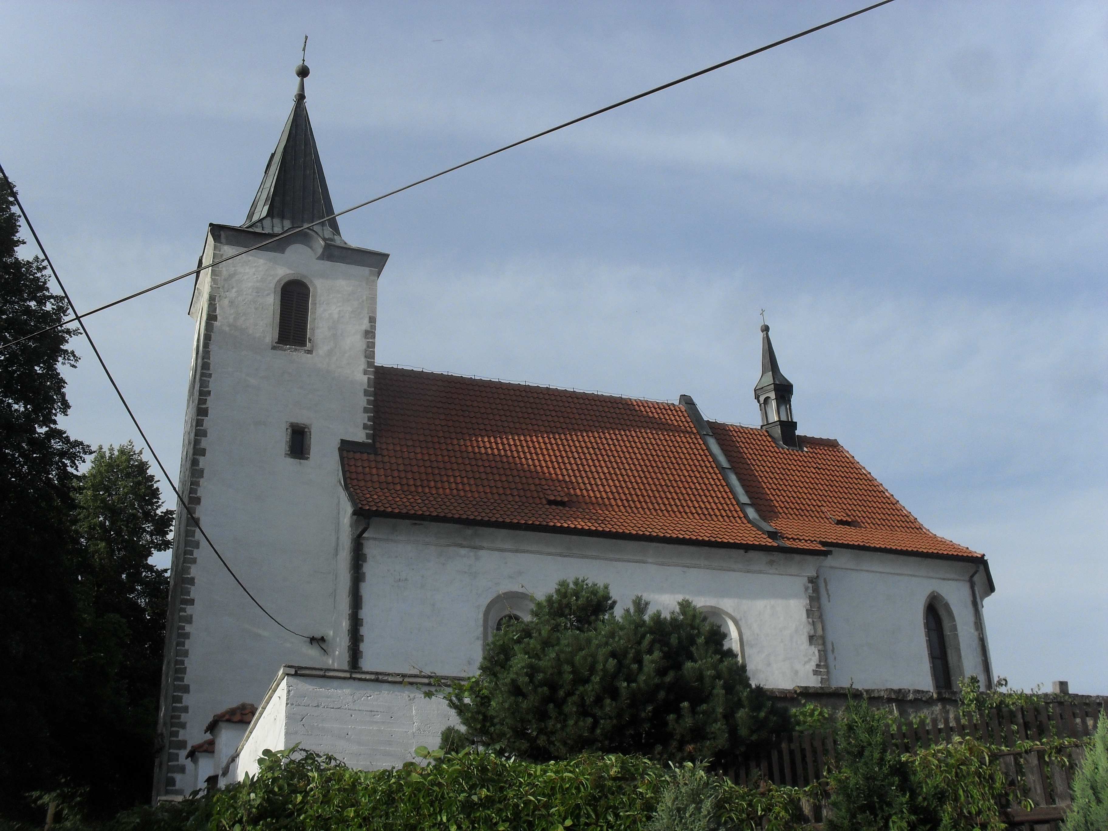 Fotografie pořízena v obci Kvášňovice.